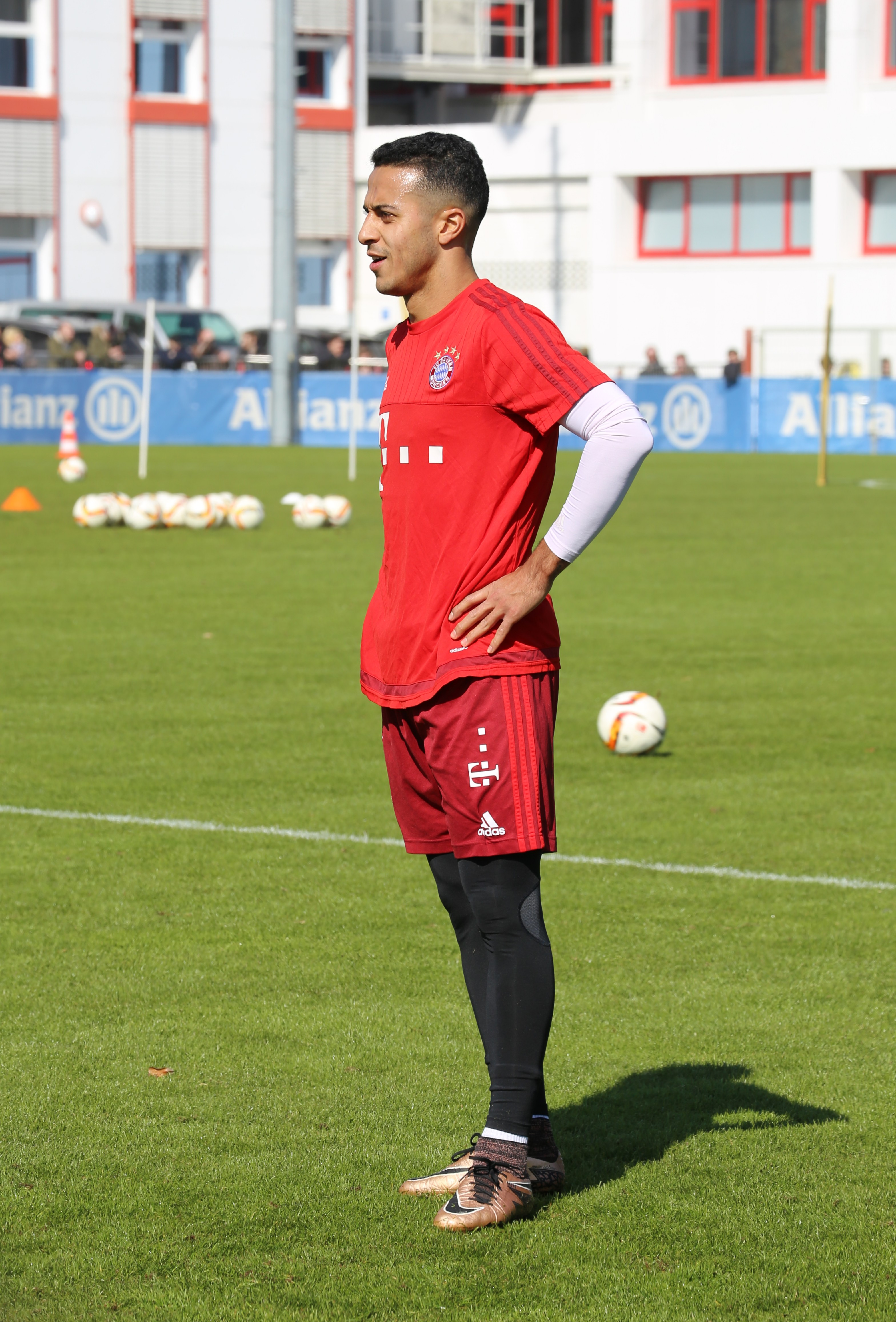 Thiago Alcântara beim Training auf dem Gelände des FC Bayern München